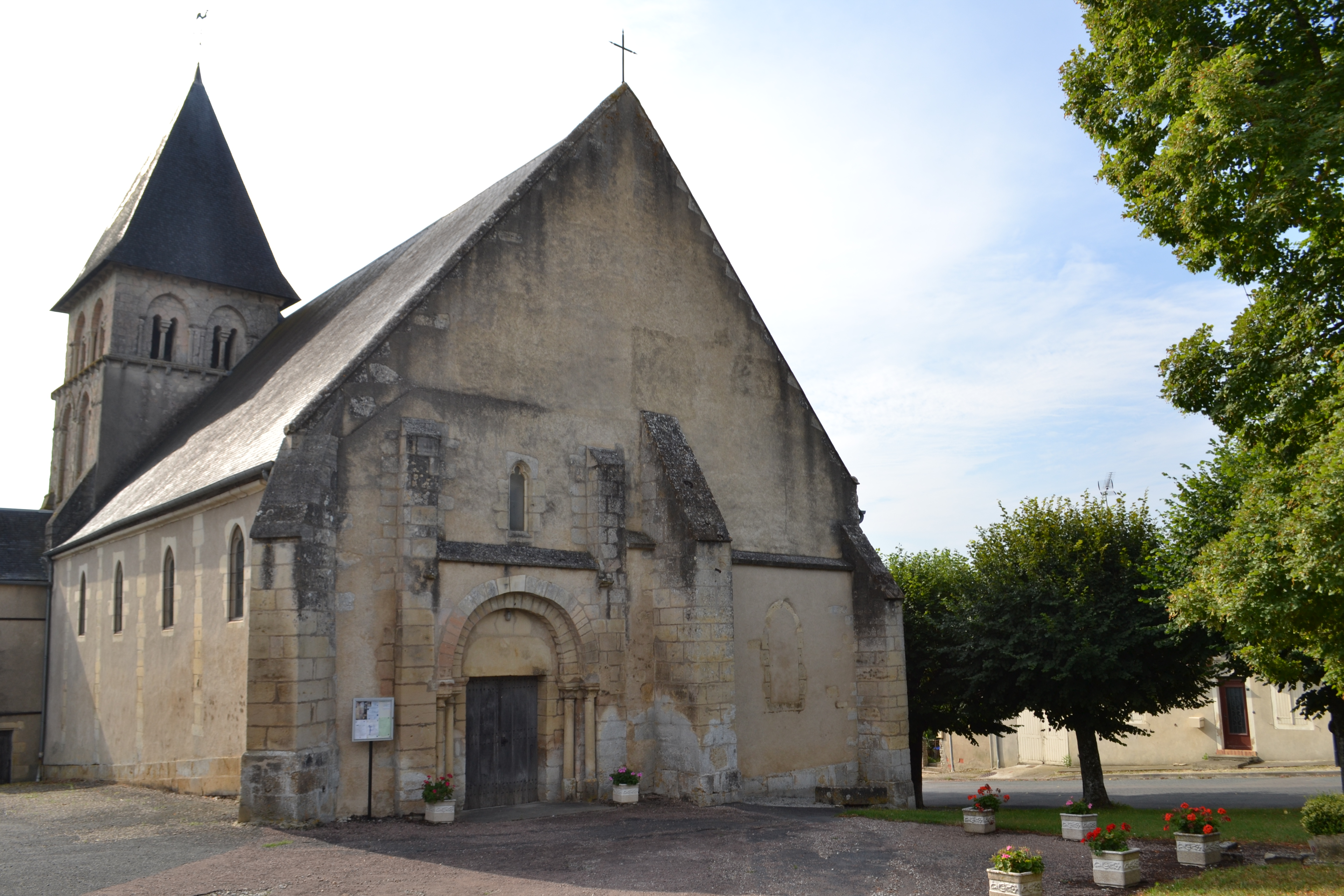 Église d'Ourouer-les-Bourdelins (Cher).